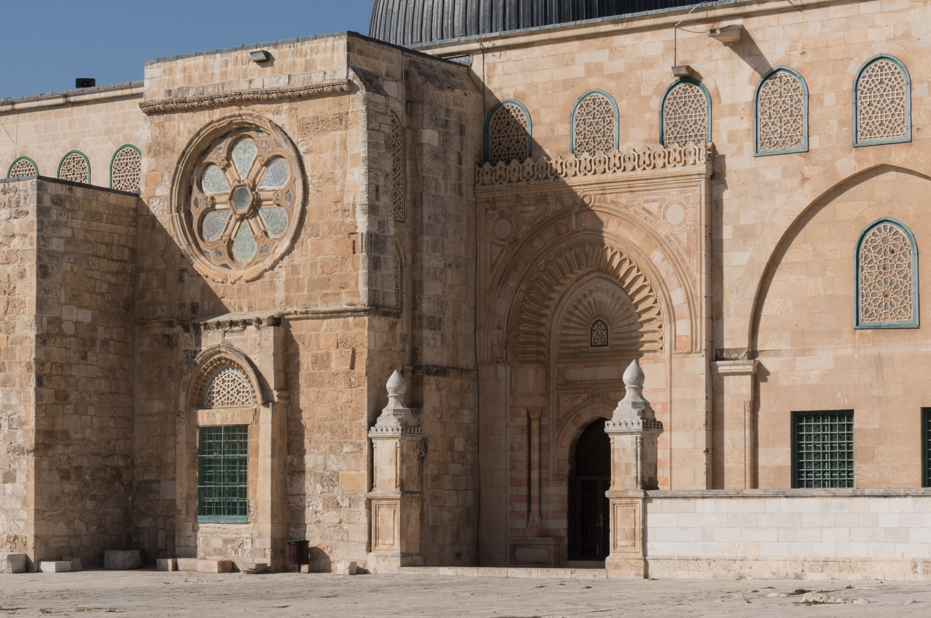 DSC06639-2.jpg Jerusalem